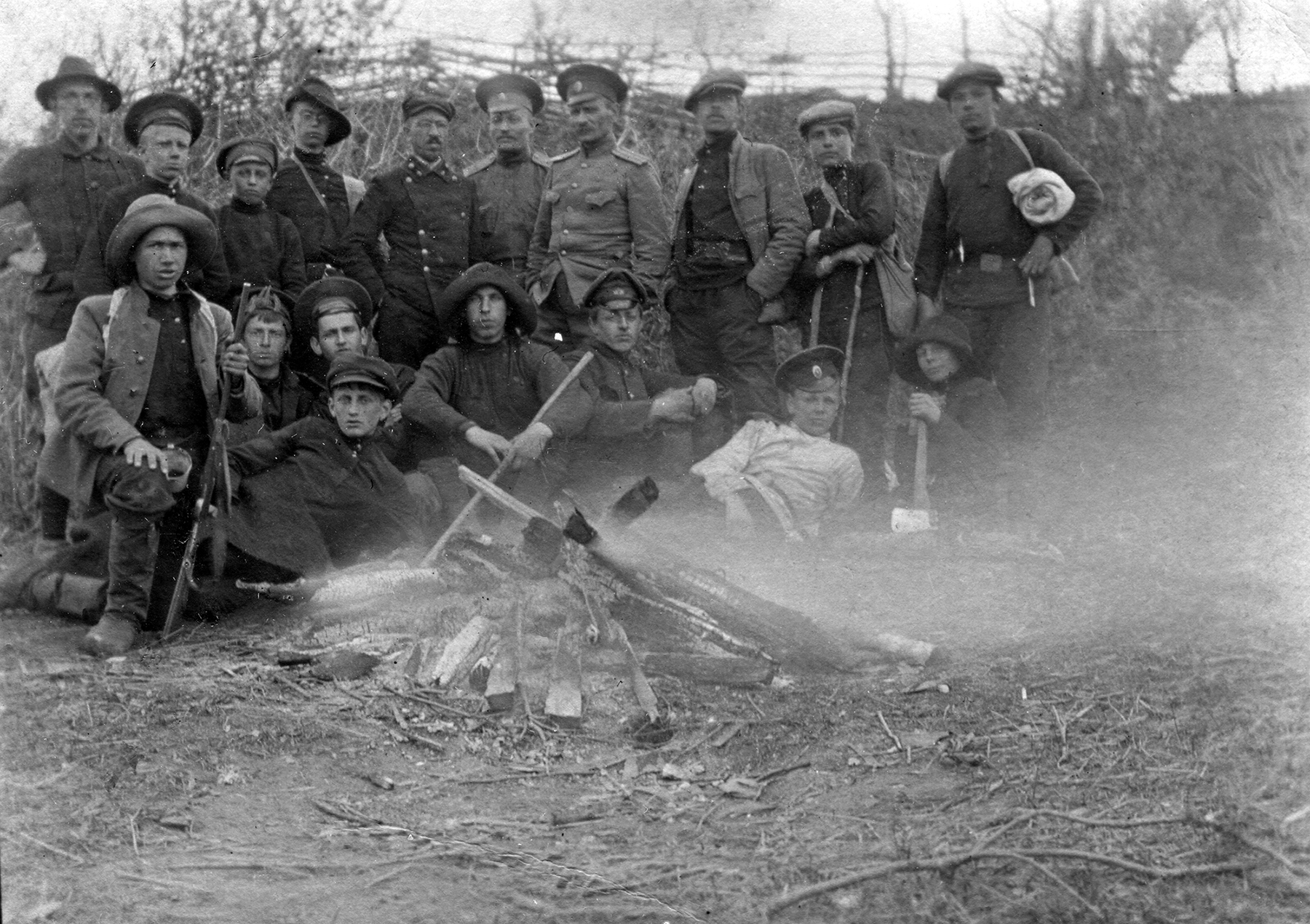 Подполковник В. К. Арсеньев (стоит в центре) с учениками Хабаровского реального училища во время экскурсии на хребет Хехцир. Второй слева в верхнем ряду — сын В. К. Арсеньева Воля (Владимир), третий слева - будущий геолог и ветеран БАМа Павлов Владимир, 1901 г.р.Посёлок Корфовский, 28 августа — 3 сентября 1914 года